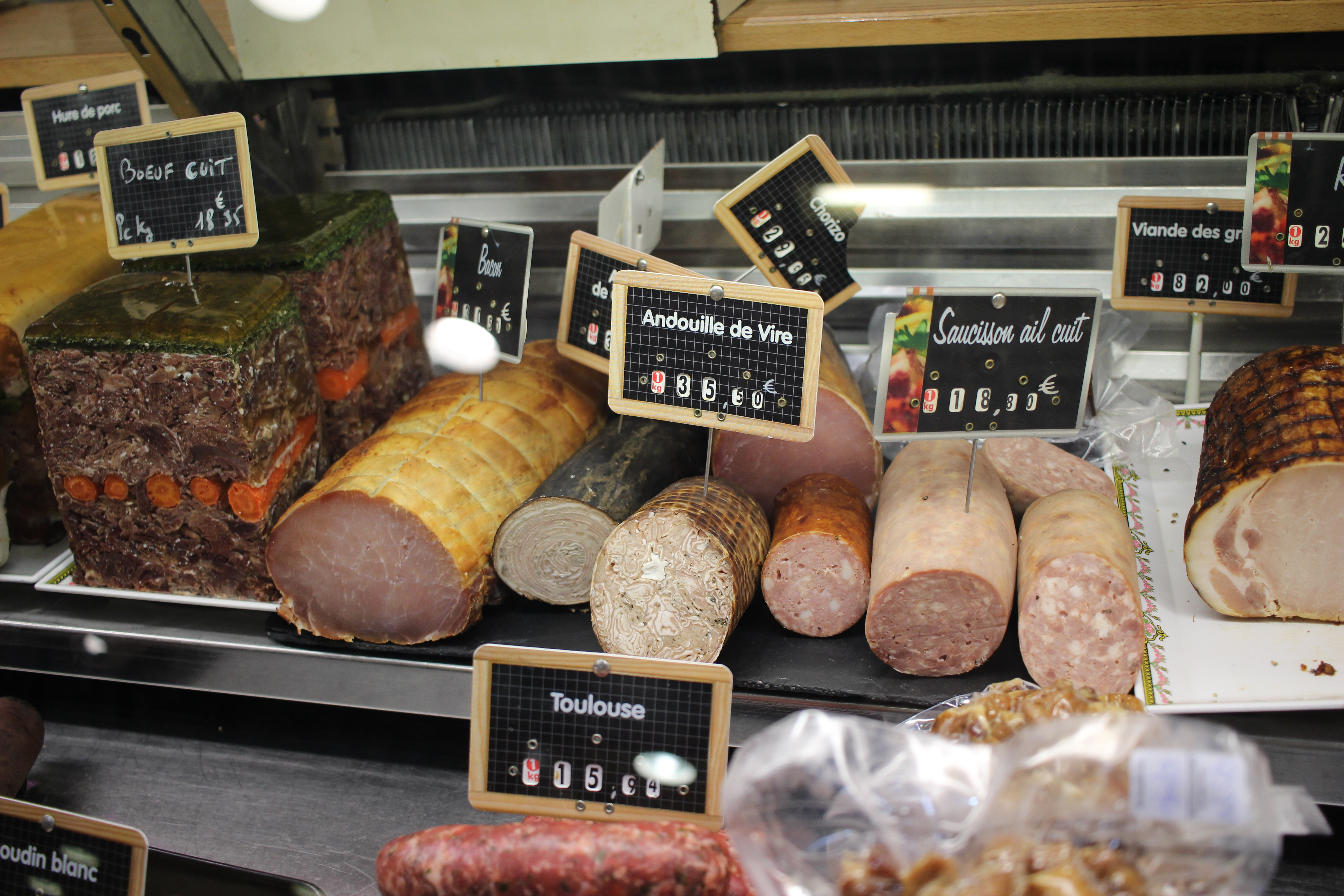 Tours - Halles de Tours - Avril 2019 - étals de charcuterie